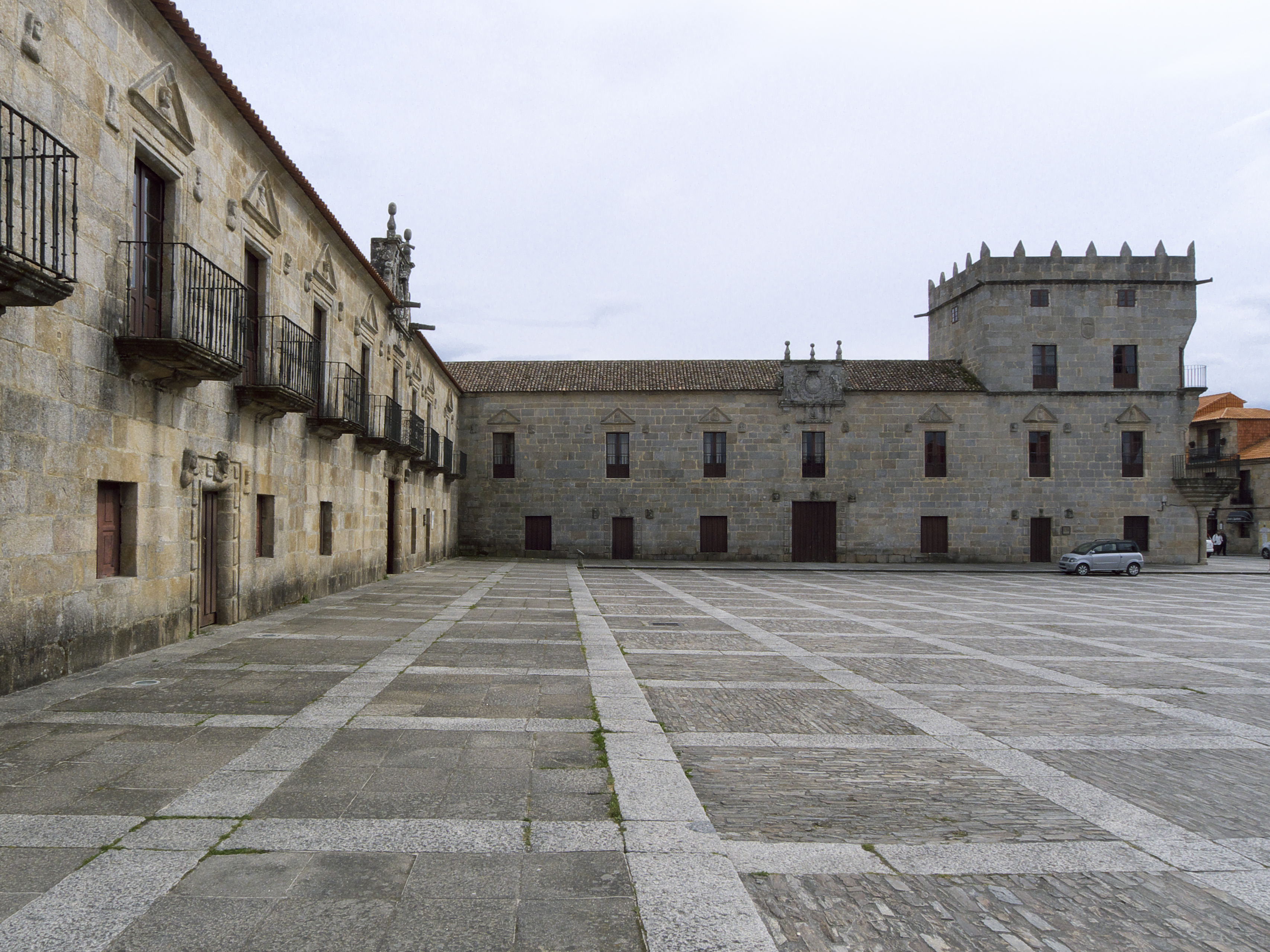 Gonzalo de Valladares Sarmiento y Andrade recibe el título de Vizconde de Fefiñanes (1647)